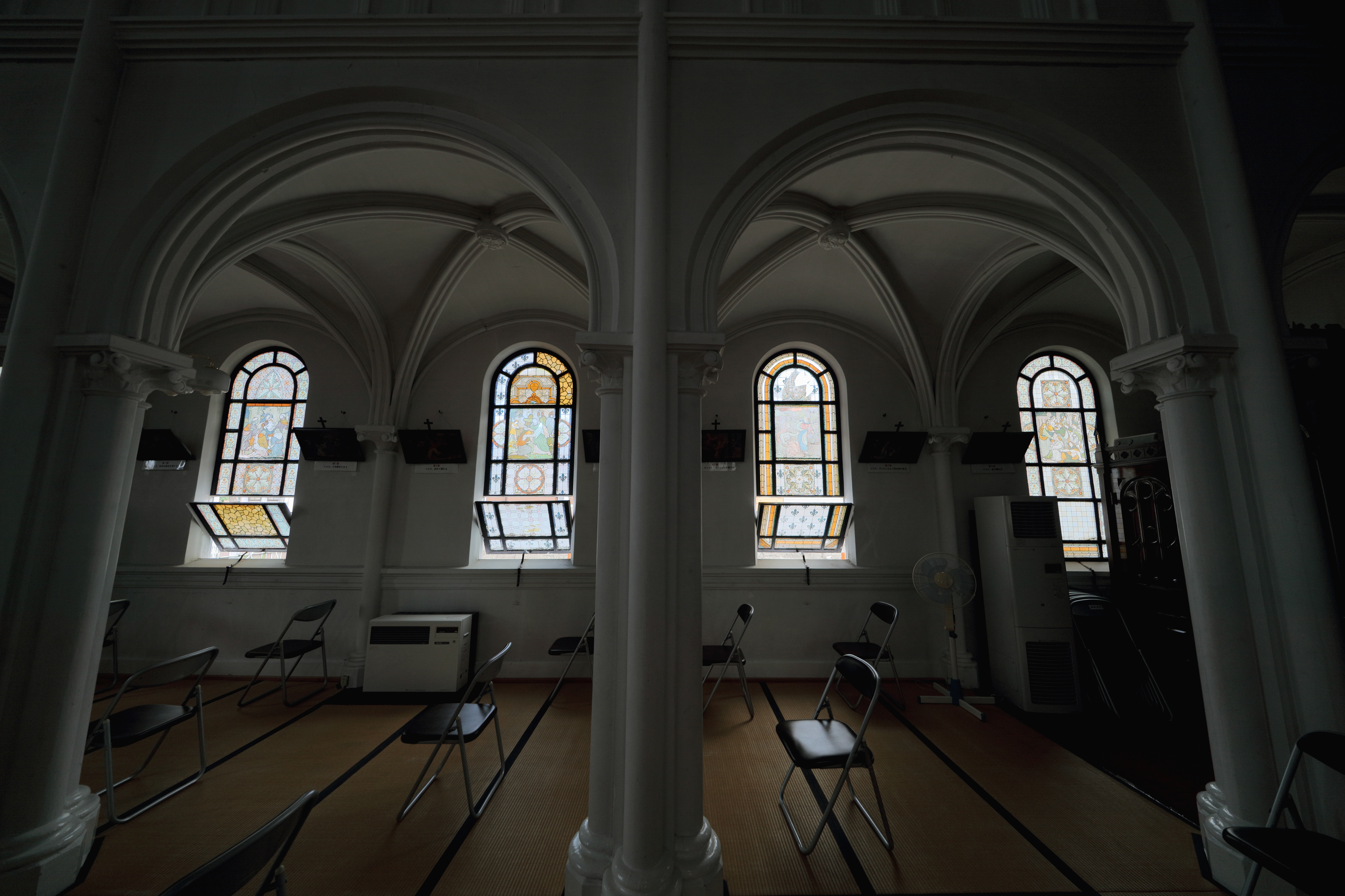 山形県鶴岡市にある鶴岡カトリック教会天主堂の窓。 日本国内では唯一の窓絵である。